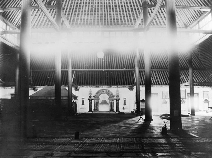 Foto. Bagian dalam ruang utama (menghadap mihrab) Masjid Ageng Karaton Surakarta